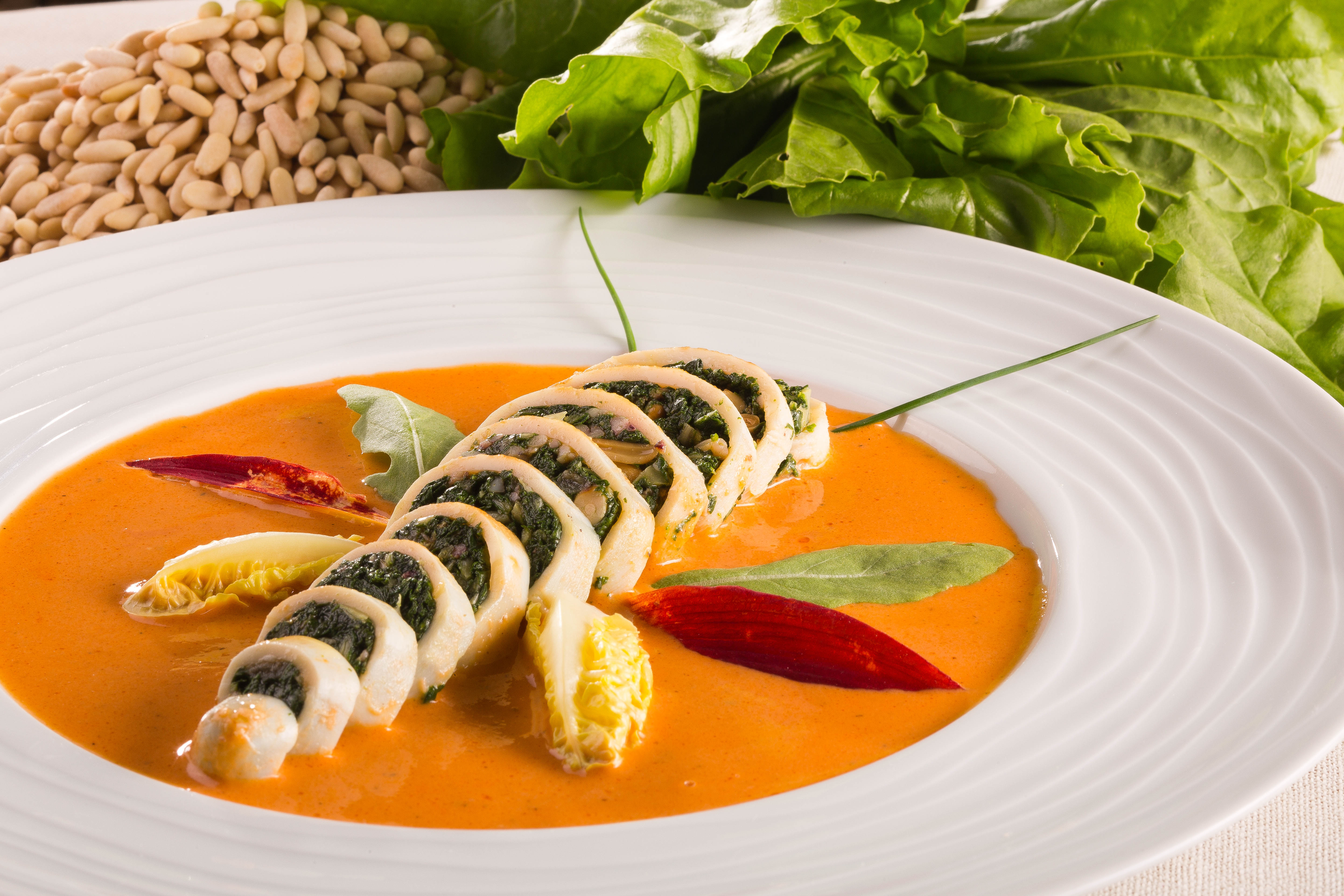 Totènes ou petits calmars farcis aux épinards et aux pignons